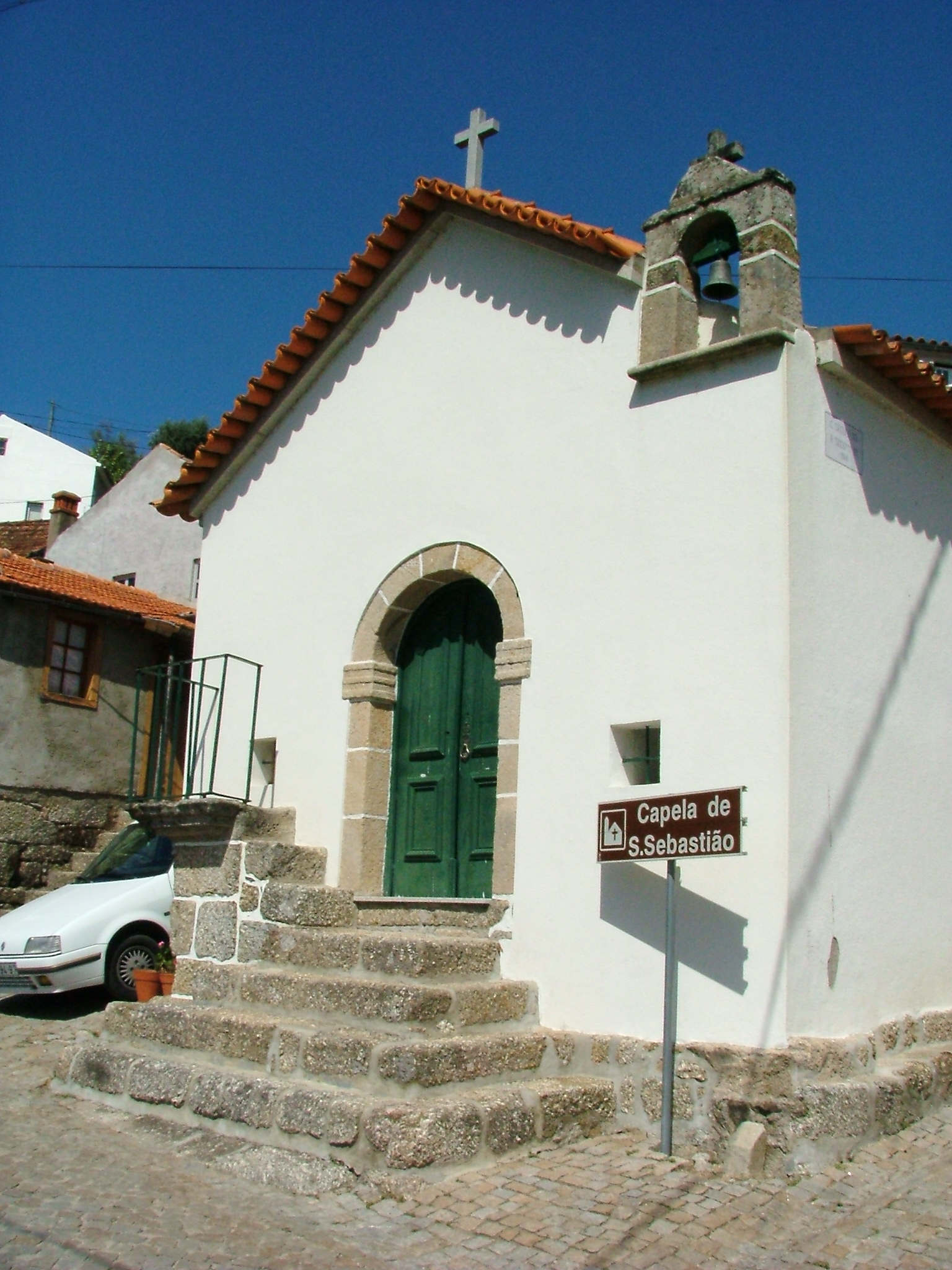 Capela de São Sebastião, freguesia de S.Gião, Concelho de Oliveira do Hospital, Distrito de Coimbra